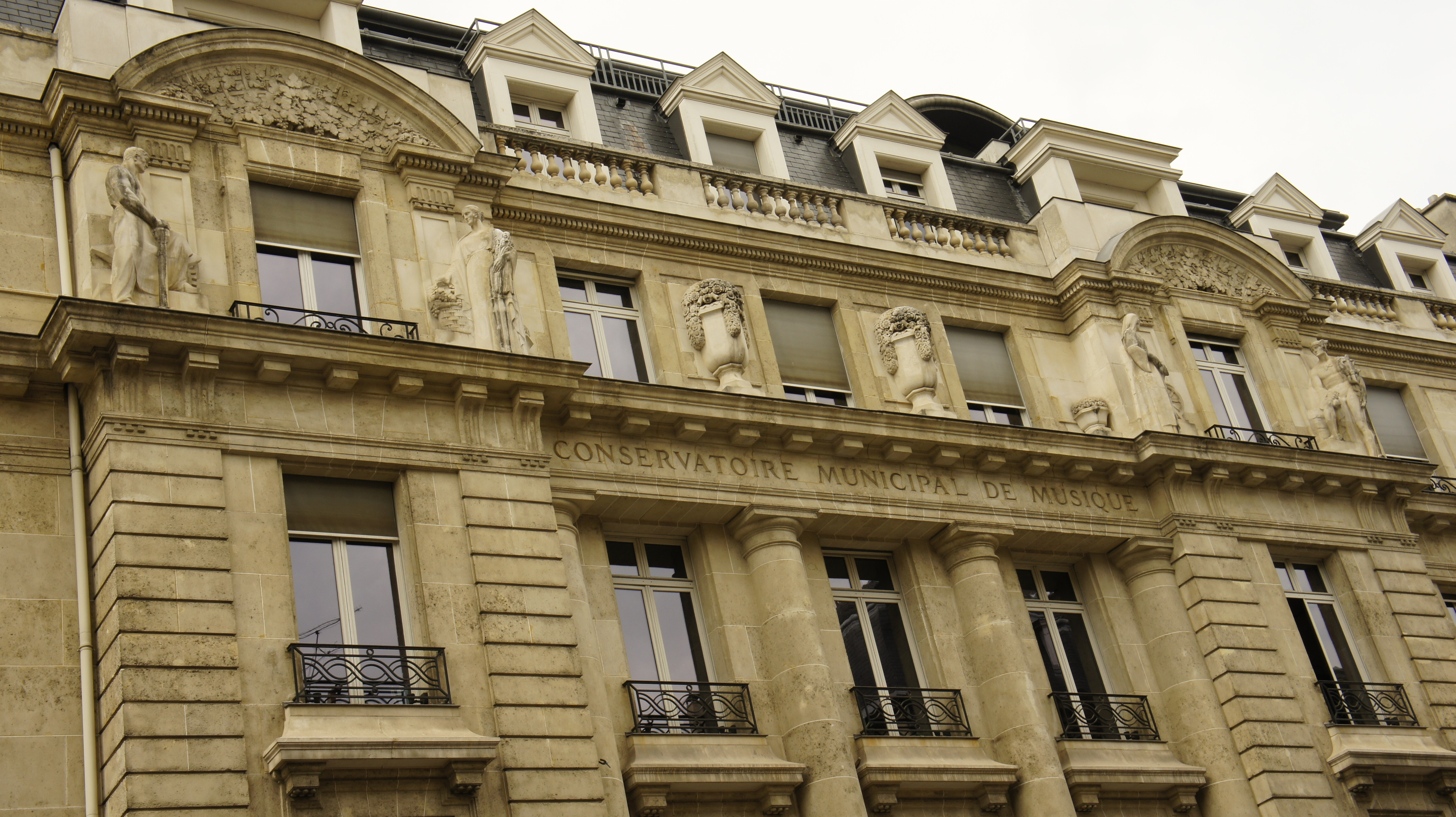 exemples d'art déco en façade à Reims. Rue de Carnot, ancien conservatoire de musique .